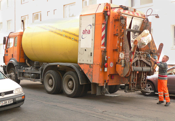 aha-Fahrzeug beim Einsammeln des Gelben Sacks in Hannover. Foto aufgenommen von Benutzer Benutzer:AxelHH, Mai 2006